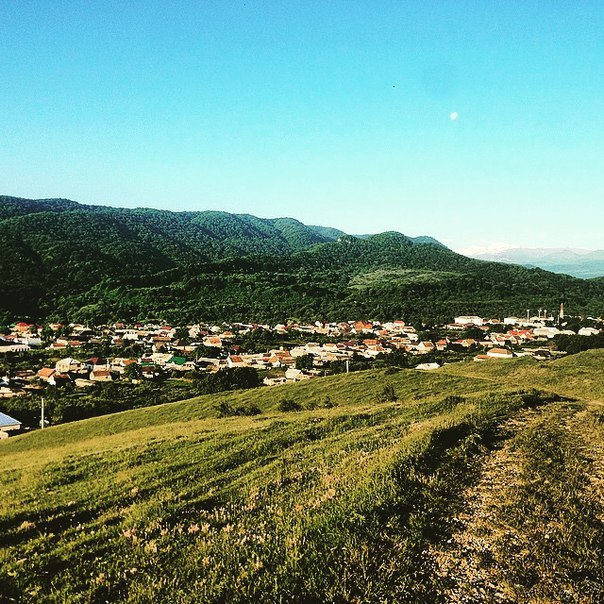 Адыгэбзэ: Лэшынкъей къуажэр